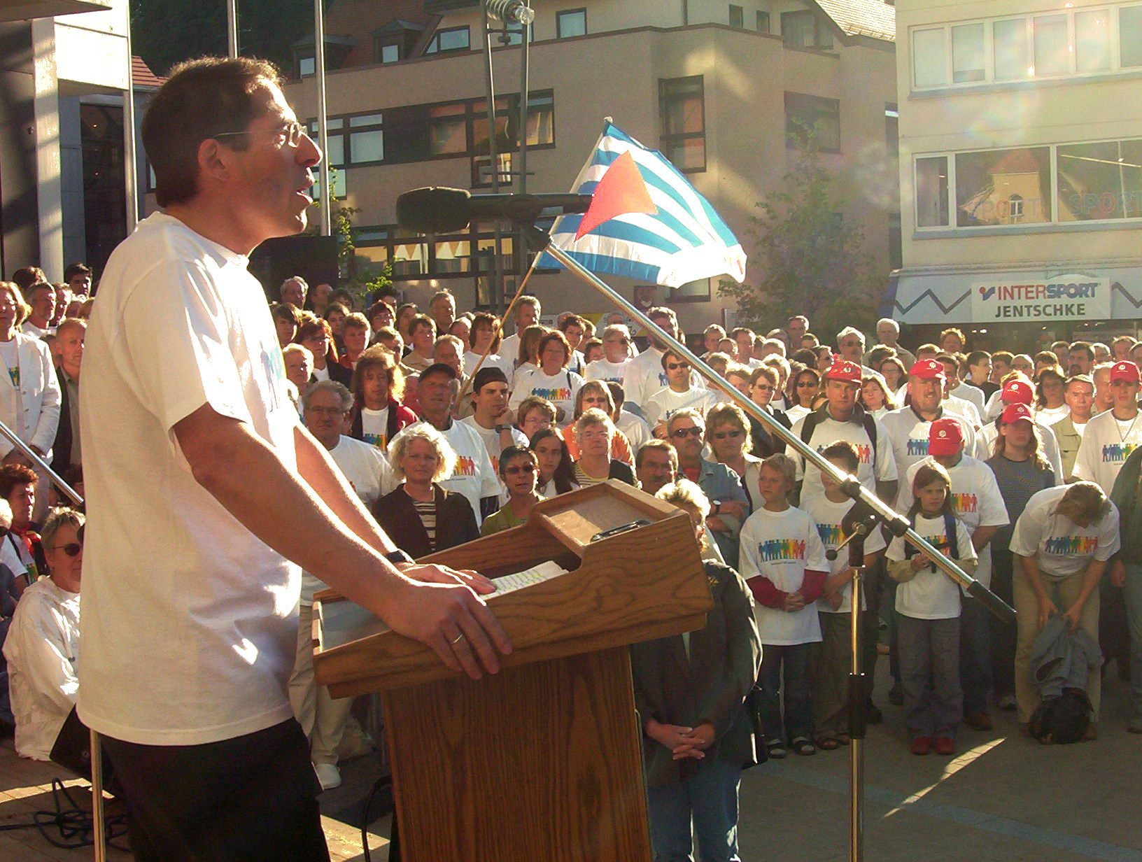 Oberbürgermeister Bernhard Ilg bei einer Rede auf dem Heidenheimer Rathausplatz anlässlich einer Kundgebung gegen Rechts.